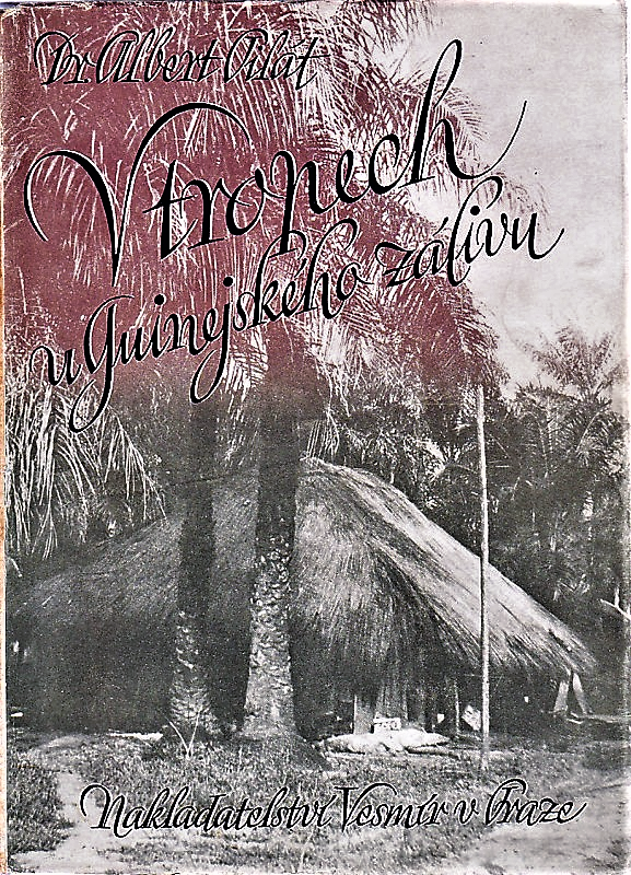 V tropech v Guinejském zálivu (In den Tropen des Golfs von Guinea)